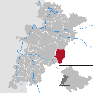 Bad Liebenstein in Thuringia - Wartburgkreis